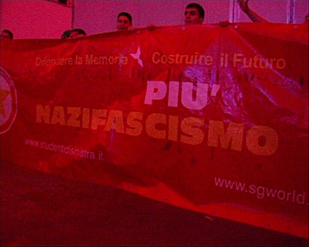 Campo d'Azione di Forza Nuova